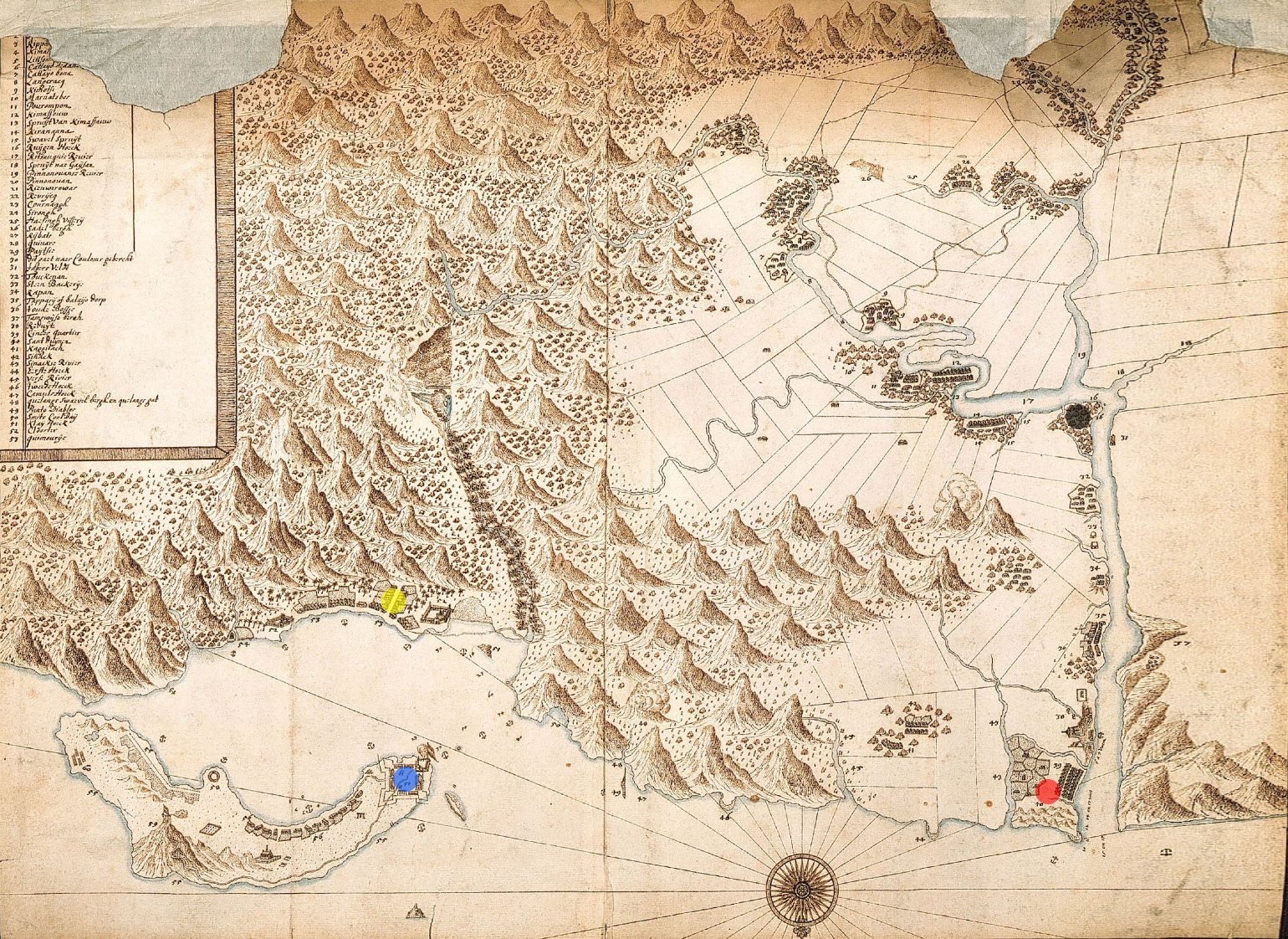 《淡水與其附近村社暨雞籠島略圖》